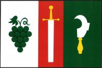 Stříbrnice (UH), vlajka